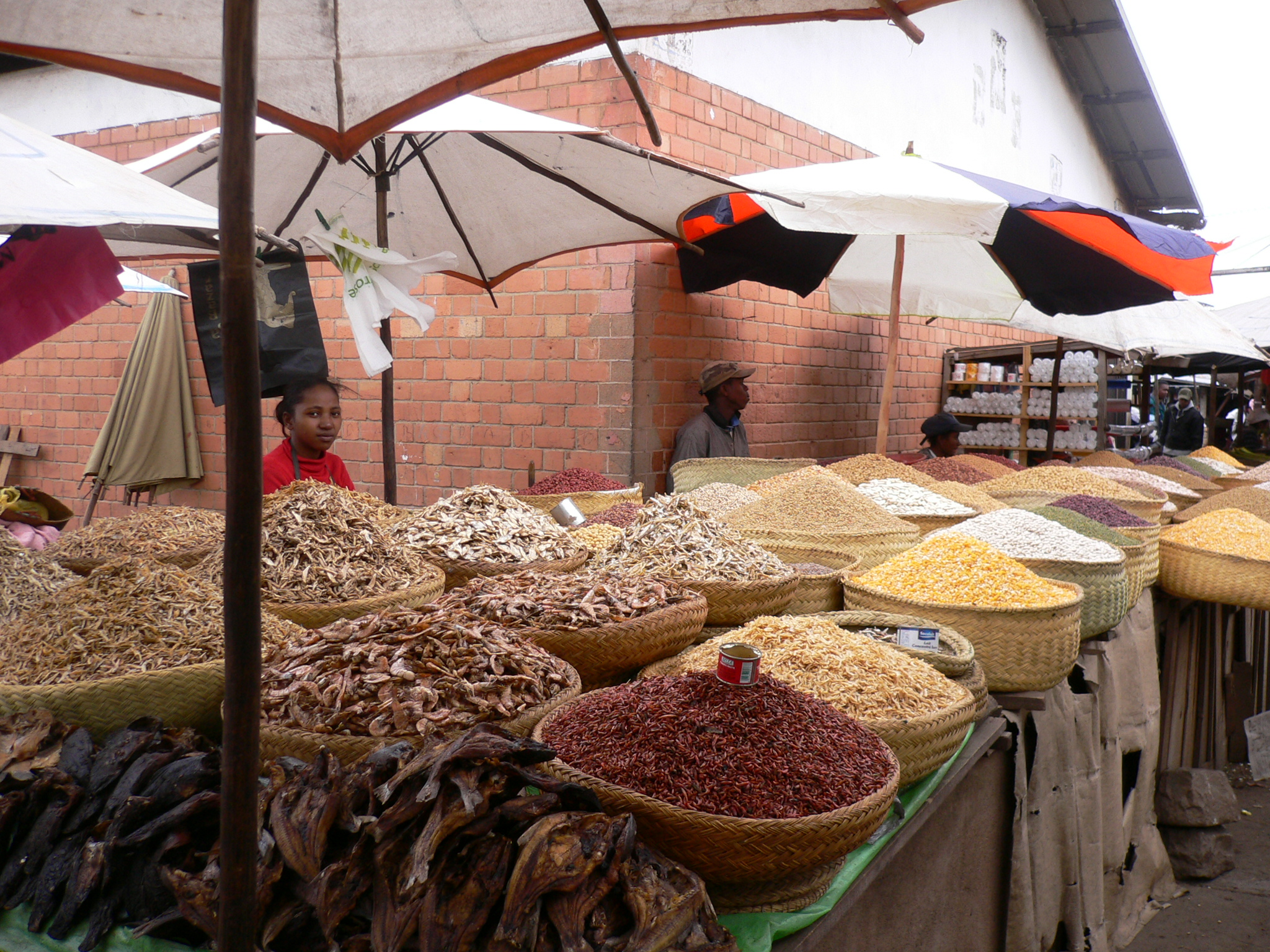 Market in Madagascar